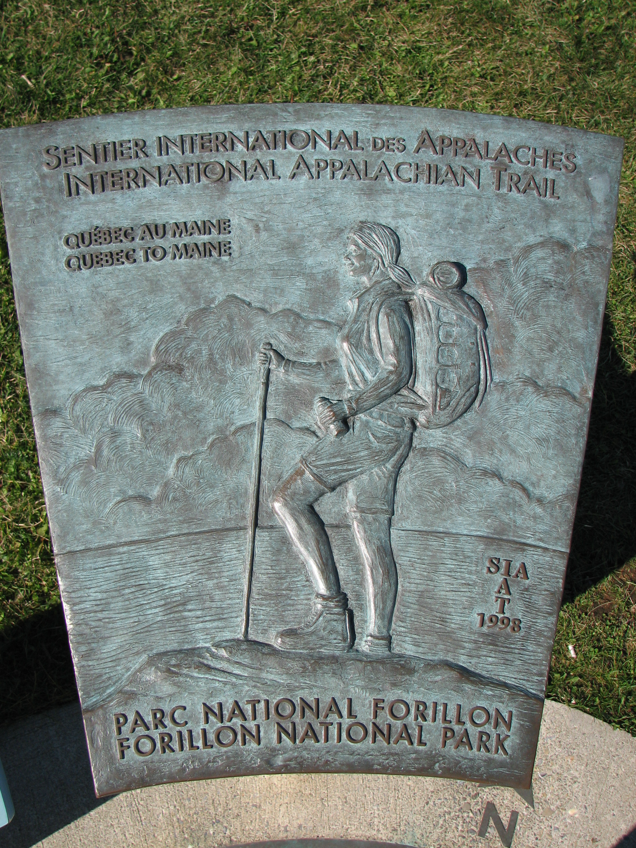 Plaque du Sentier International des Appalaches sur le cap Gaspé, Gaspésie, Québec / International Appalachian Trail Plate in cap Gaspé, Québec